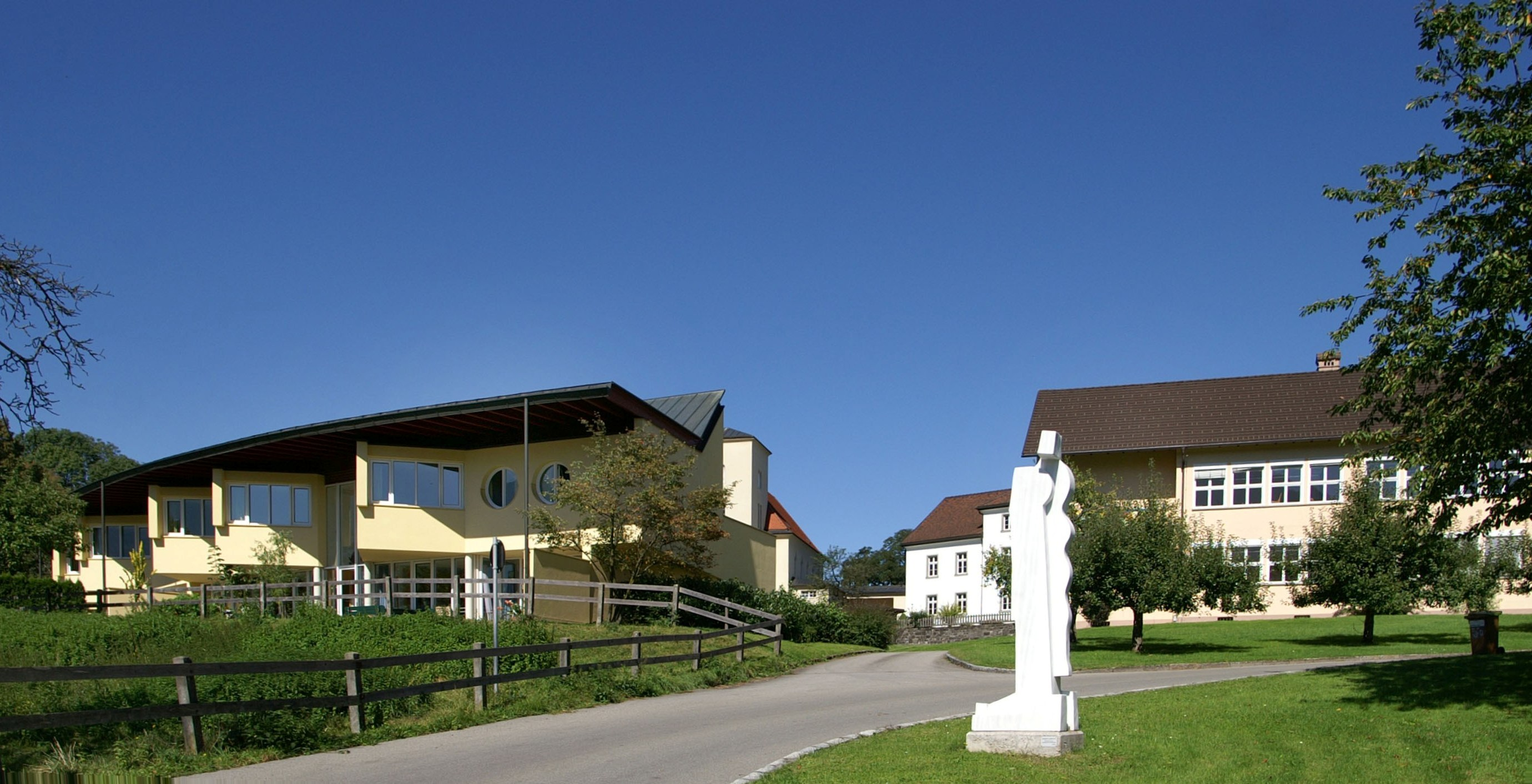 Das Bild zeigt einen Teil des Sozialpädagogischen Internat des Vorarlberger Kinderdorf in Schlins. Links einen Teil des Gebäudes, wo die Wohngruppen untergebracht sind, rechts einen Teil der alten Schule (heute sind dort Werkräume untergebracht), das weiße Gebäude im Hintergrund gehört zum Verwaltungstrakt.